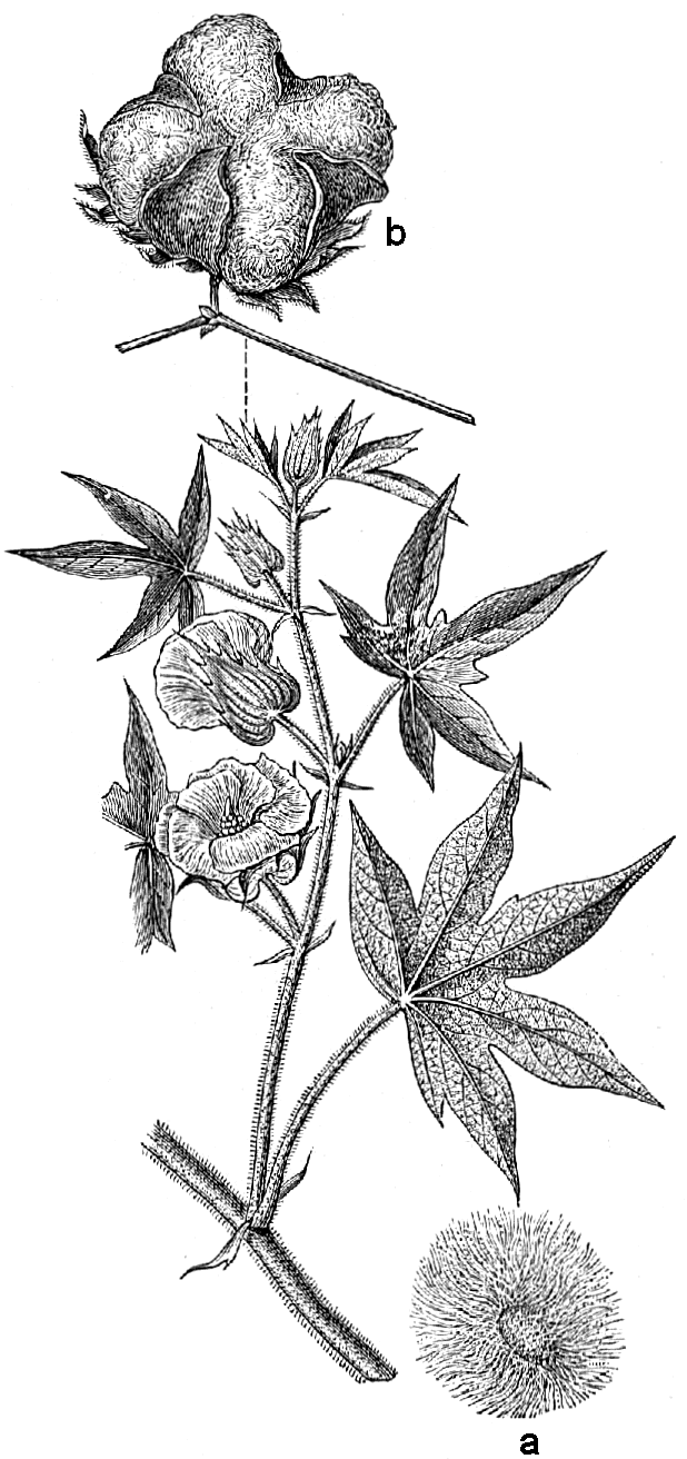 Gossypium herbaceum a frö, b frukt.